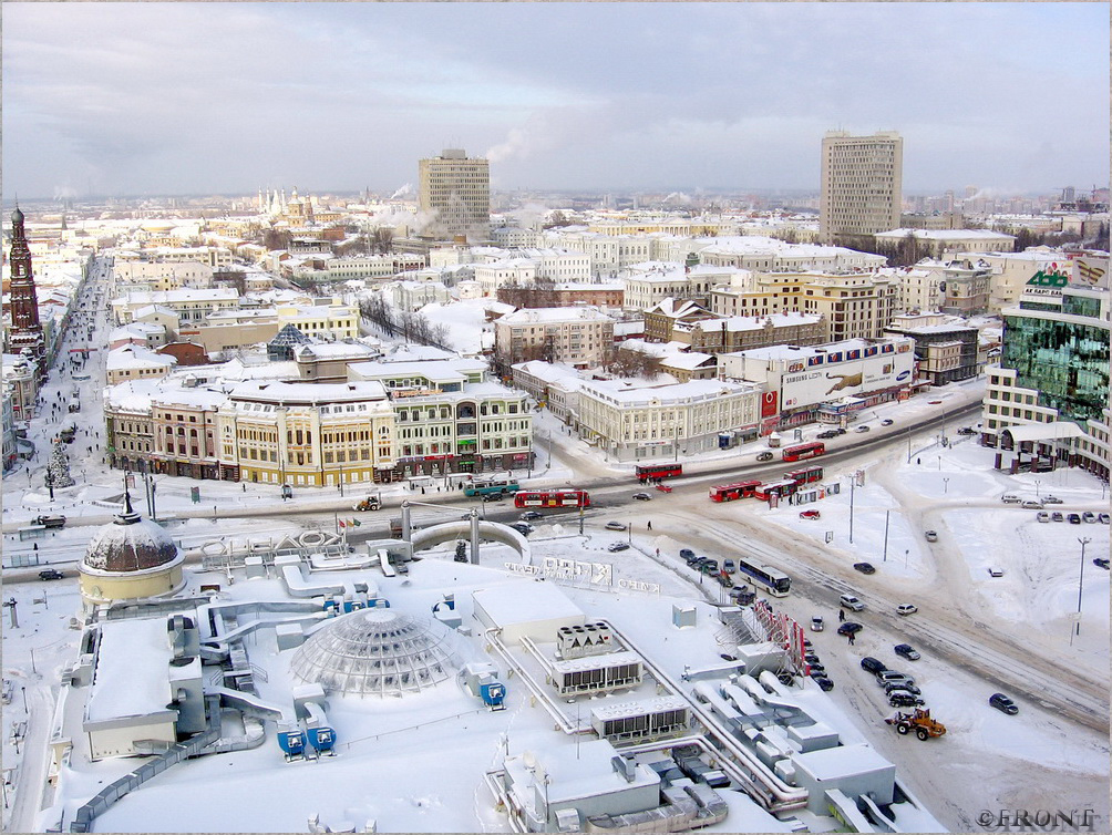 Вид из окна Гранд отель Казань